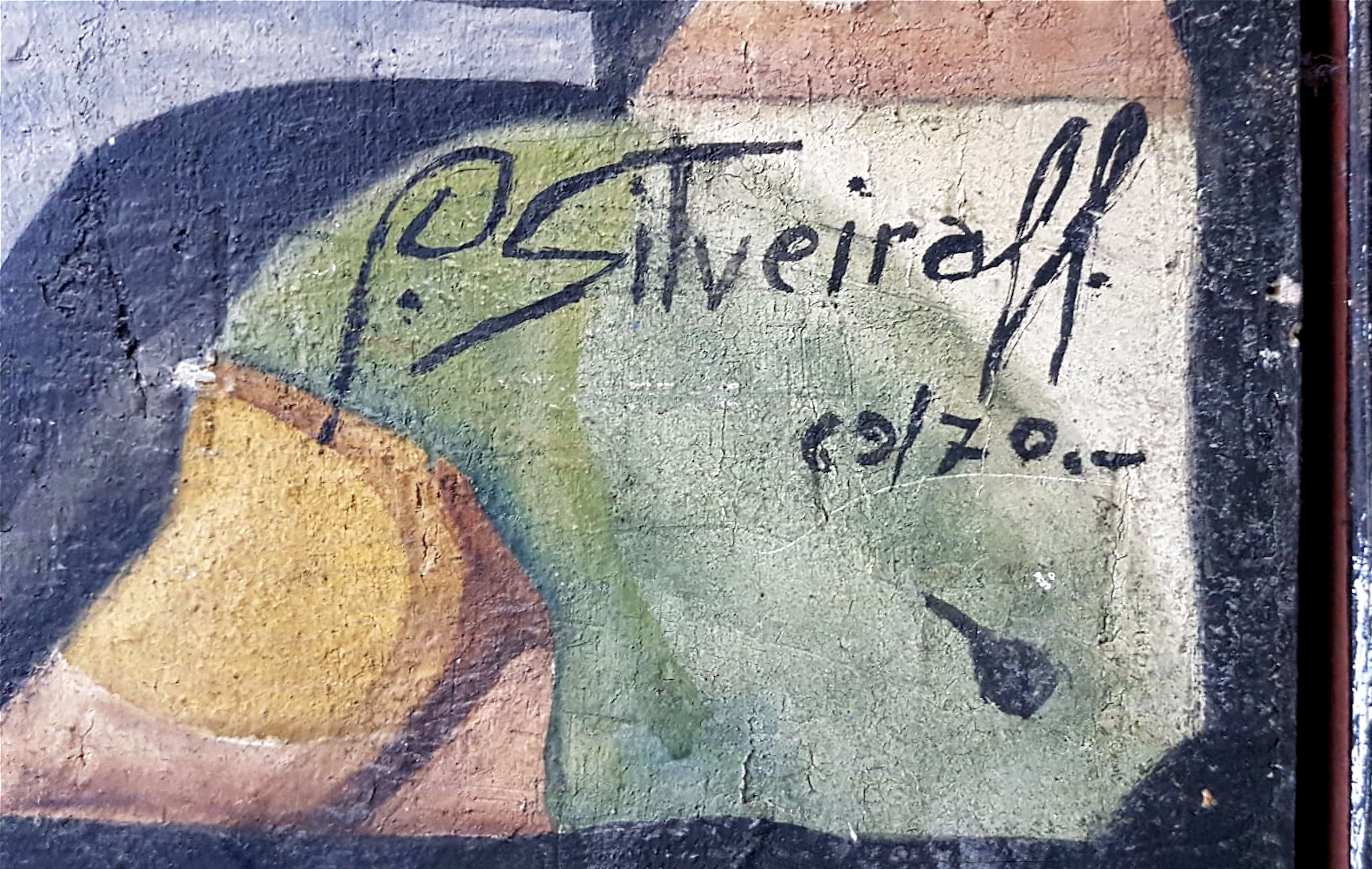 Fábricas, 1966. Óleo sobre aglomerado de madera, 245 x 400 cm. Detalle de la firma. Guillermo Silveira García (1922–1987) Description painter, sculptor, military personnel and art educatorDate of birth/death 11 January 1922 11 May 1987Location of birth/death Segura de León BadajozWork periodcirca 1945-1987Work location BadajozAuthority control : Q5888937 VIAF: 100940319 ISNI: 0000 0000 7827 0108 GND: 139488154 BNE: XX4841676 creator QS:P170,Q5888937